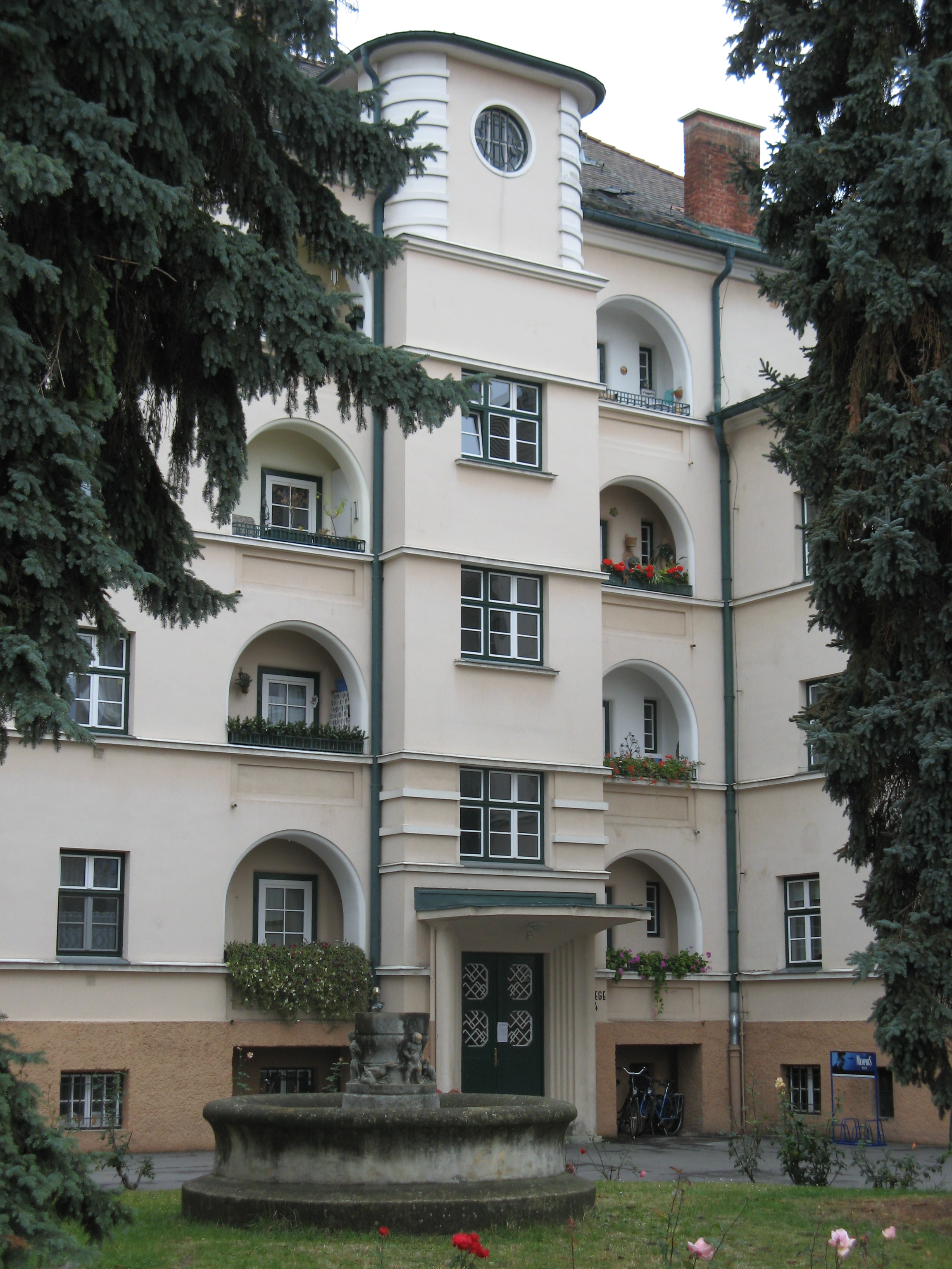 Arbeiterwohnhaus der Tabakregie (1929-30) von Ludwig Tremmel, Gaswerkgasse, Krems